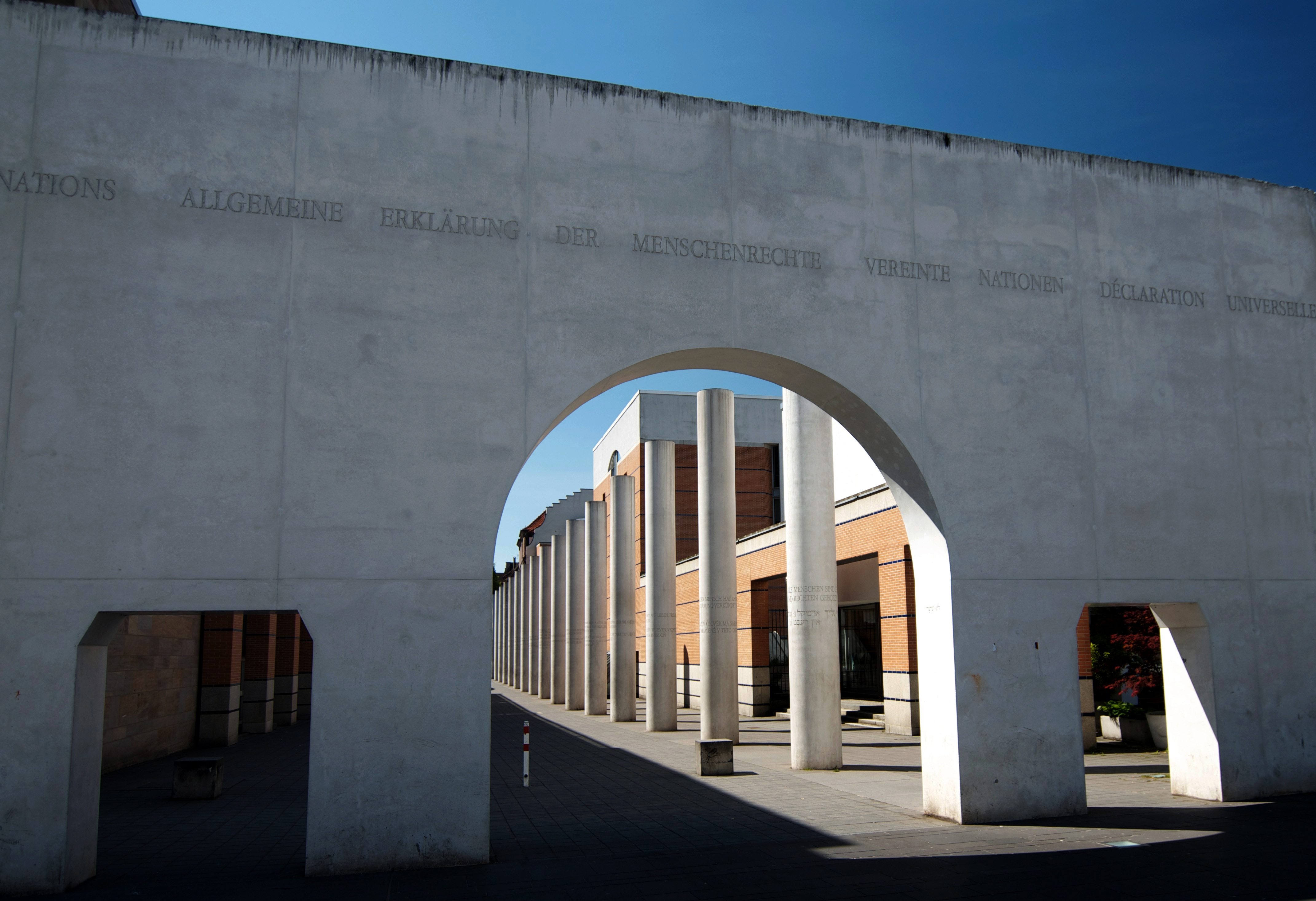 Die [Straße der Menschenrechte] von [Dani Karavan] vor dem Germanischen Nationalmuseum Nürnberg.